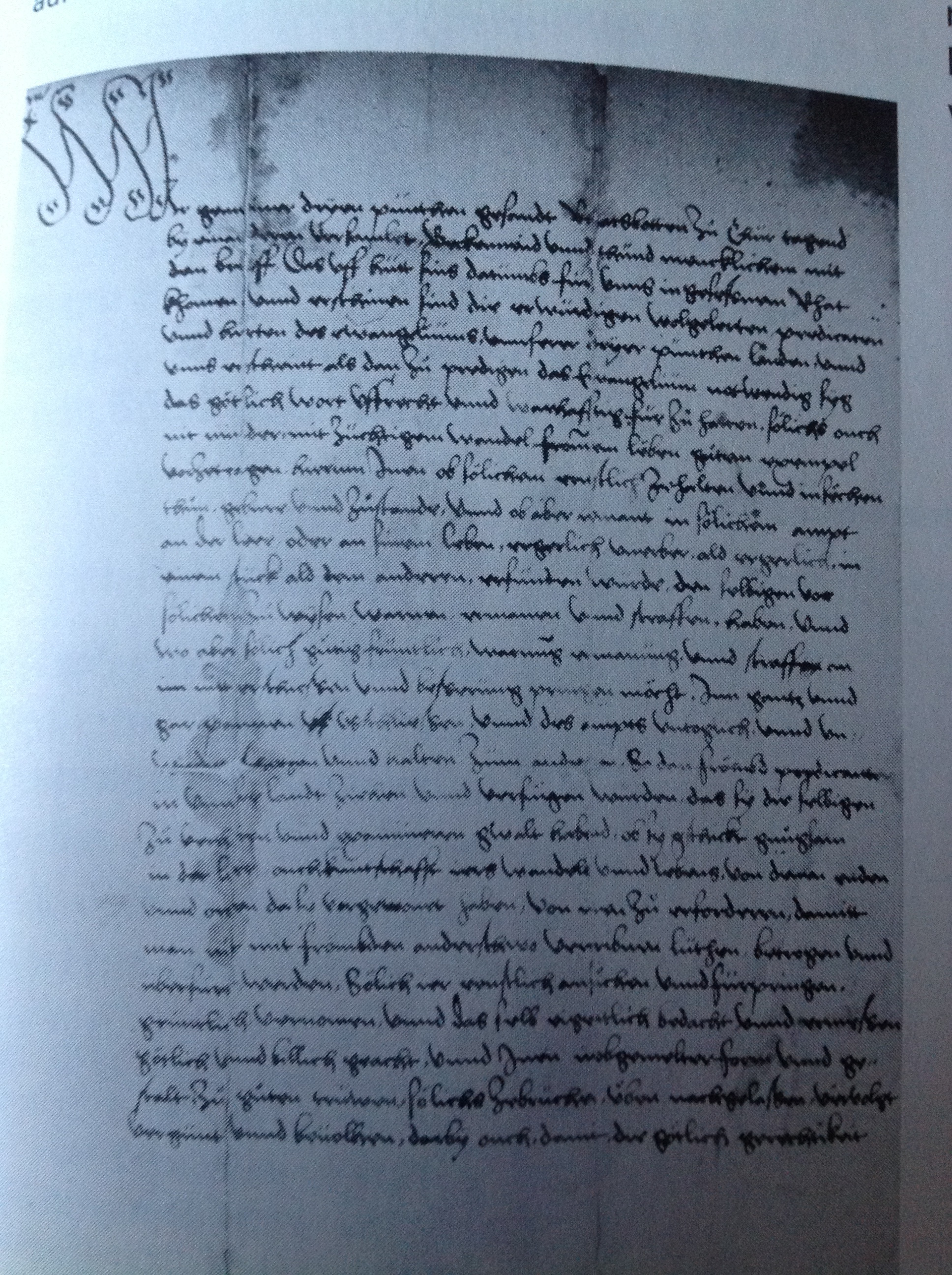 Synodalbrief von 1537, begründete die Bündner Synode